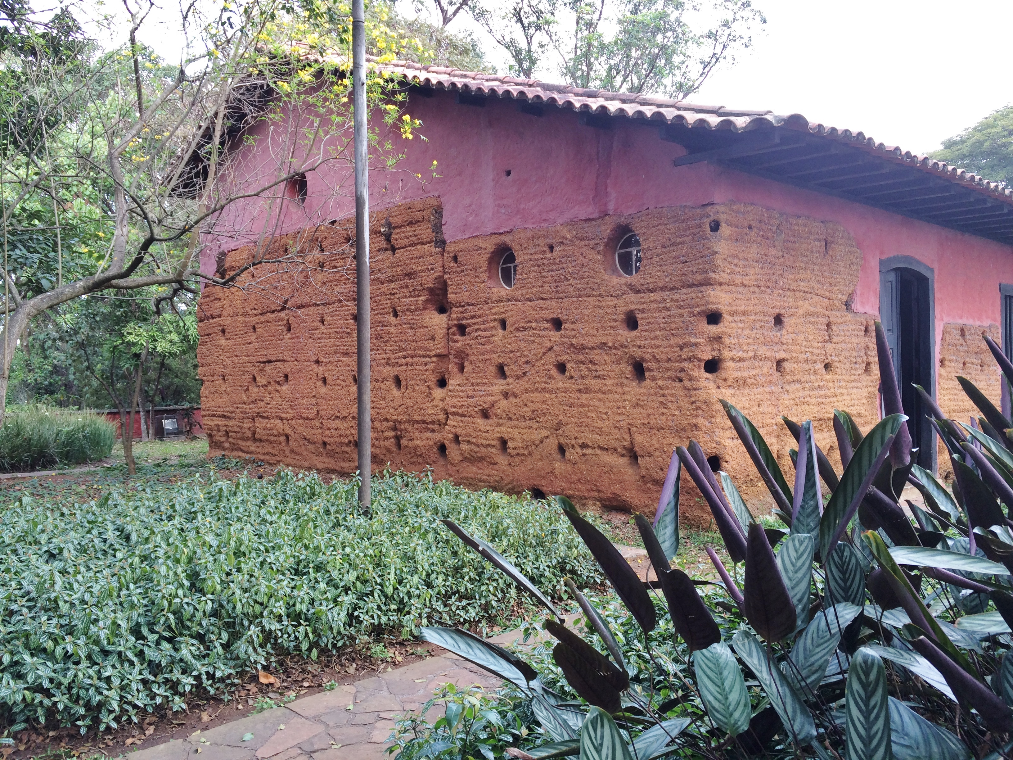 Vista direita da parte de trás da Capela do Morumbi, em São Paulo (SP), Brasil.